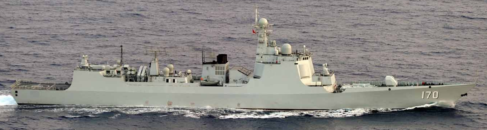 ３月３０日（土）午前７時頃、海上自衛隊第５航空群所属「Ｐ－３Ｃ」（那覇）が、沖縄本島の南西約６４０ｋｍの太平洋上を東進する中国海軍ルーヤンⅡ級ミサイル駆逐艦１隻、ジャンカイⅡ級フリゲート２隻及びユージャオ級揚陸艦１隻の合計４隻を確認した。